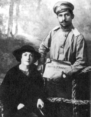 Супруиг Лазарь Каганович М. М. Приворотская